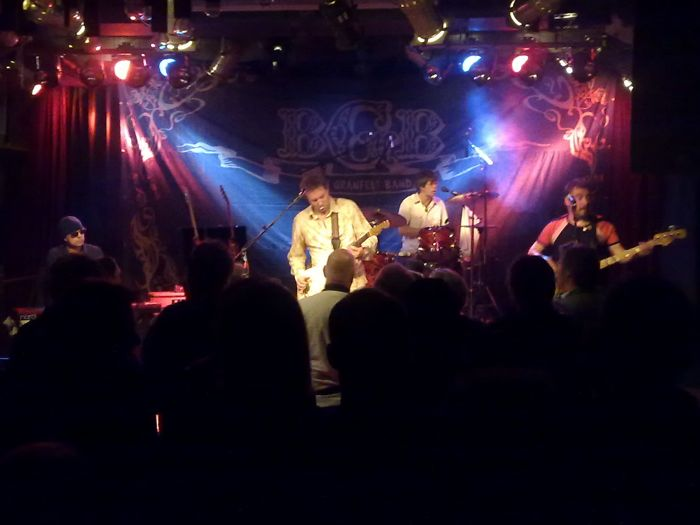 Ben Granfelt Band Saksan Hampurissa 2009